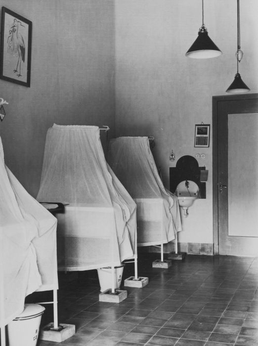 foto. de wiegen staan met poten in bakken met vloeistof ter bestrijding van ongedierte. Kamer met babywiegen in het Christelijke ziekenhuis Onder de Bogen